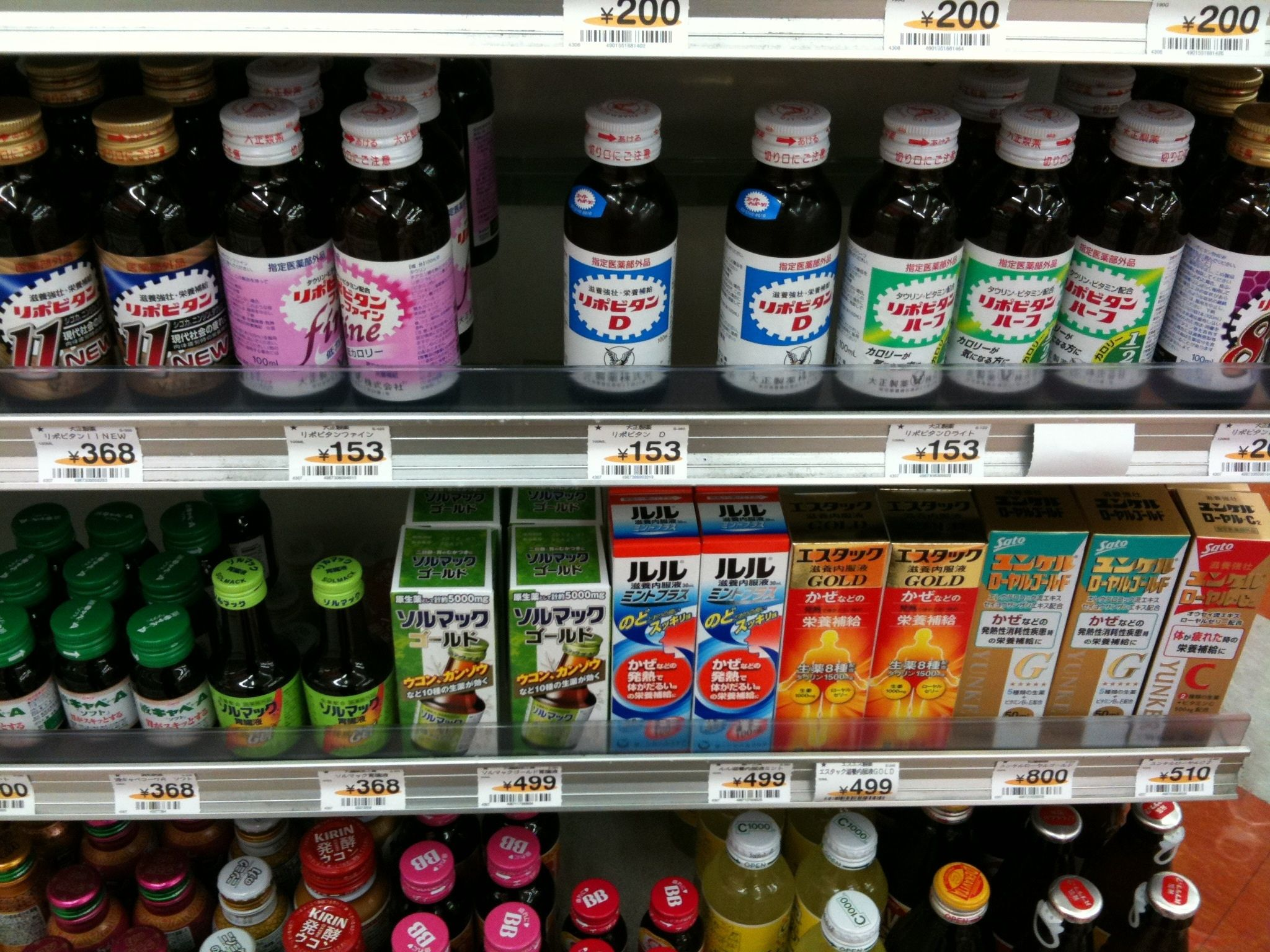 何このリポＤ人気⁈買い占めてしまおう。